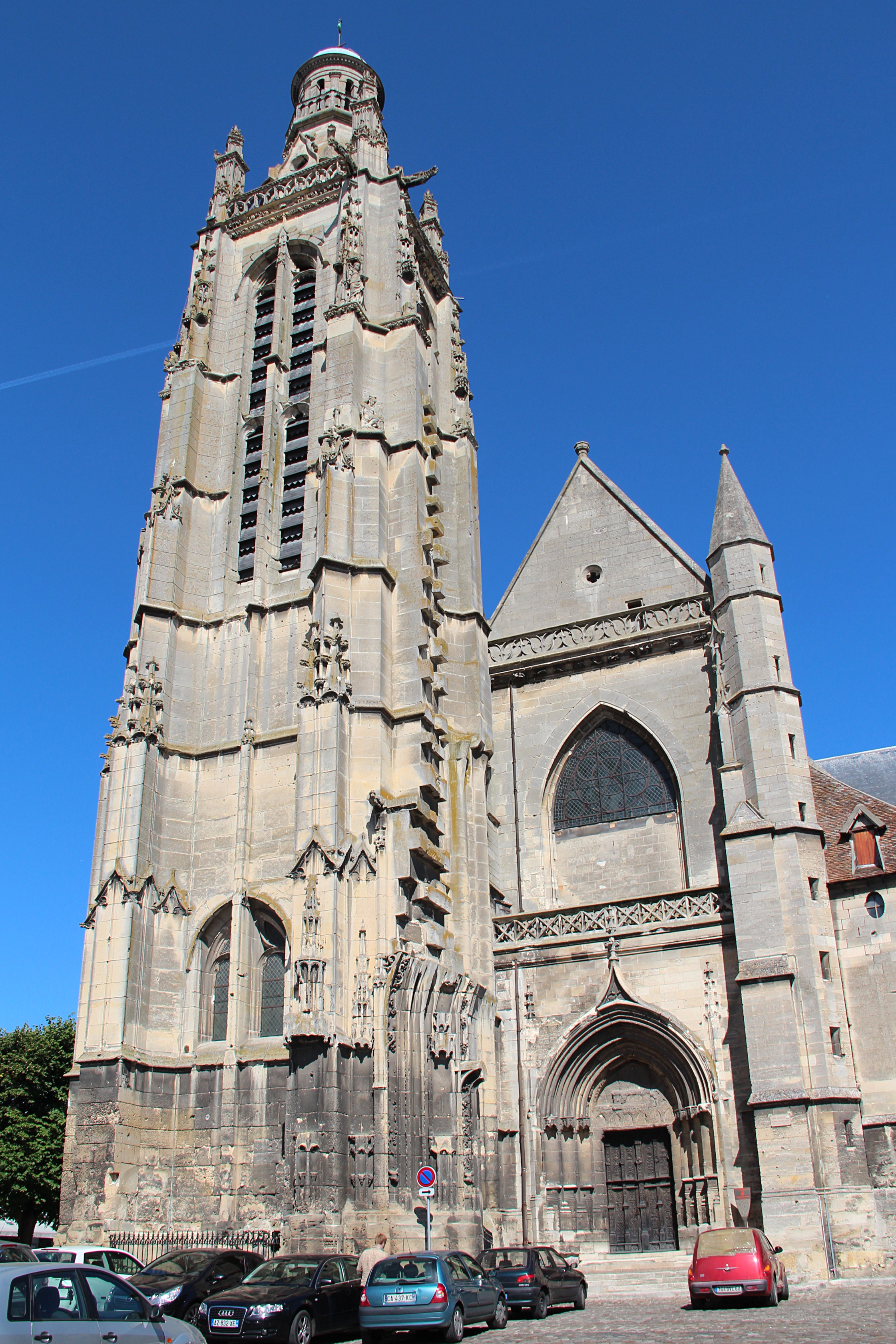 Tour et grand portail de l'église Saint-Jacques de Compiègne (Oise, France).